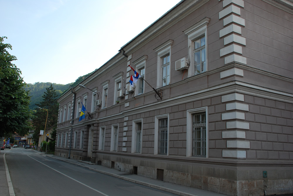 Zgrada potiče još iz vremena Austro-ugarske okupacije. Danas je ovdje smještena Skupština opštine Zvornik. Autor: Radiša Kandić